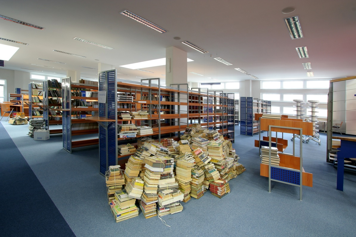 Stěhování knihovního fondu do budovy nové krajské knihovny v Karlových Varech.